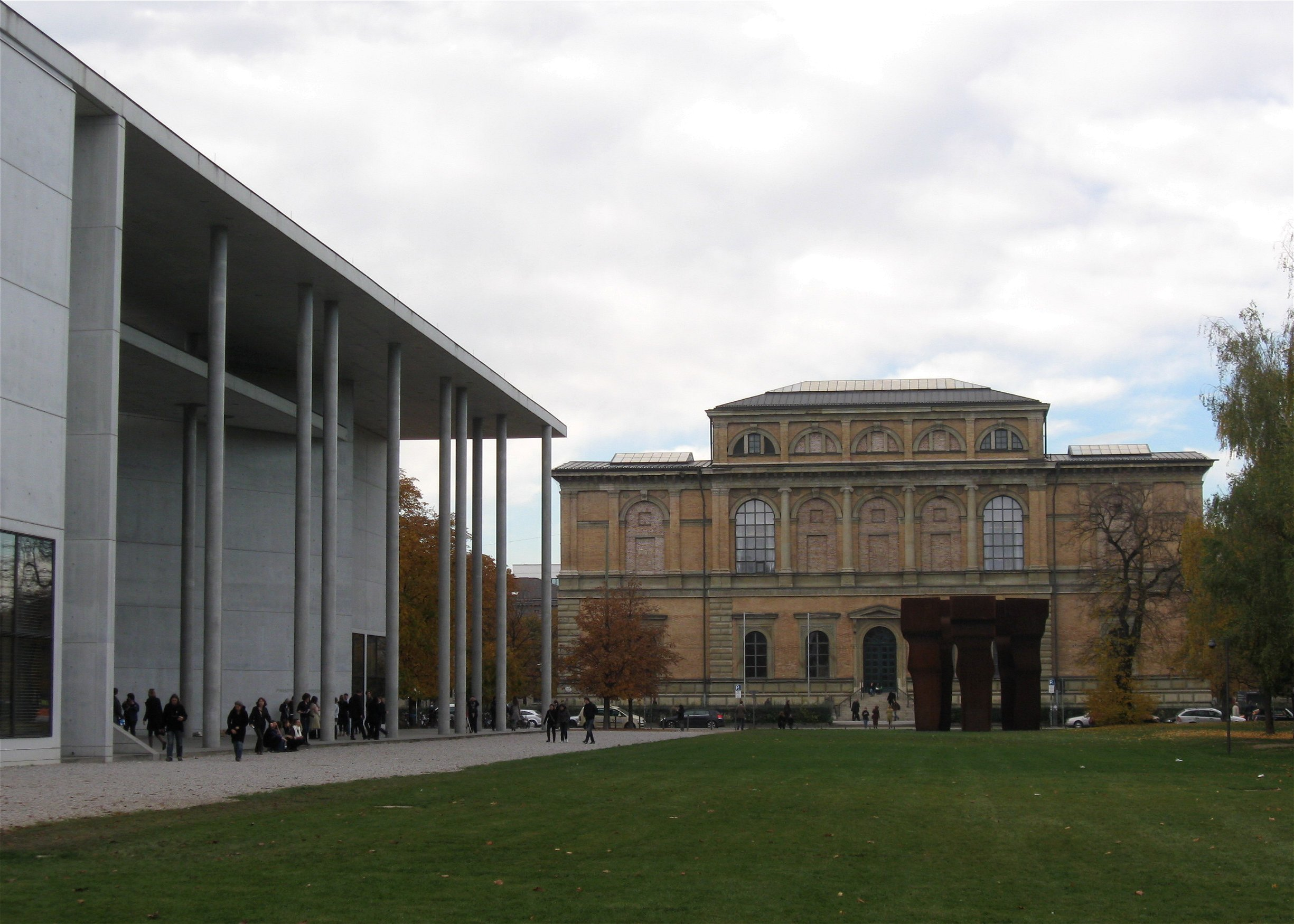 Pinakothek der Moderne (links), Alte Pinakothek (hinten) (Skulptur: Eduardo Chillida, Buscando la Luz, 1997), München